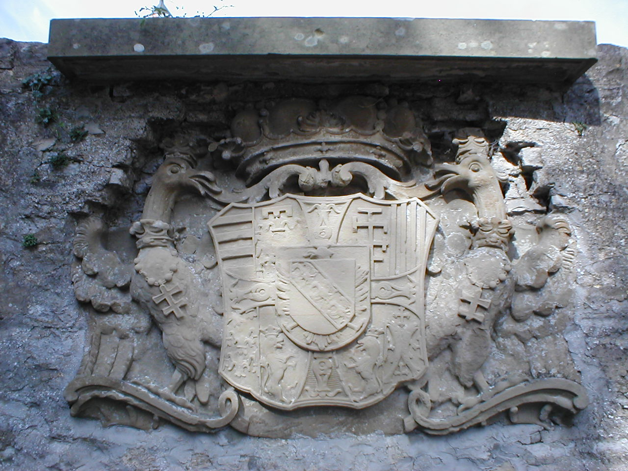 Wappen des Deutschordens-Hochmeisters Carl-Alexander von Lothringen an der Außenmauer von Schloss Heuchlingen. Auf ihn geht der barocke Umbau der Anlage 1761-81 zurück.